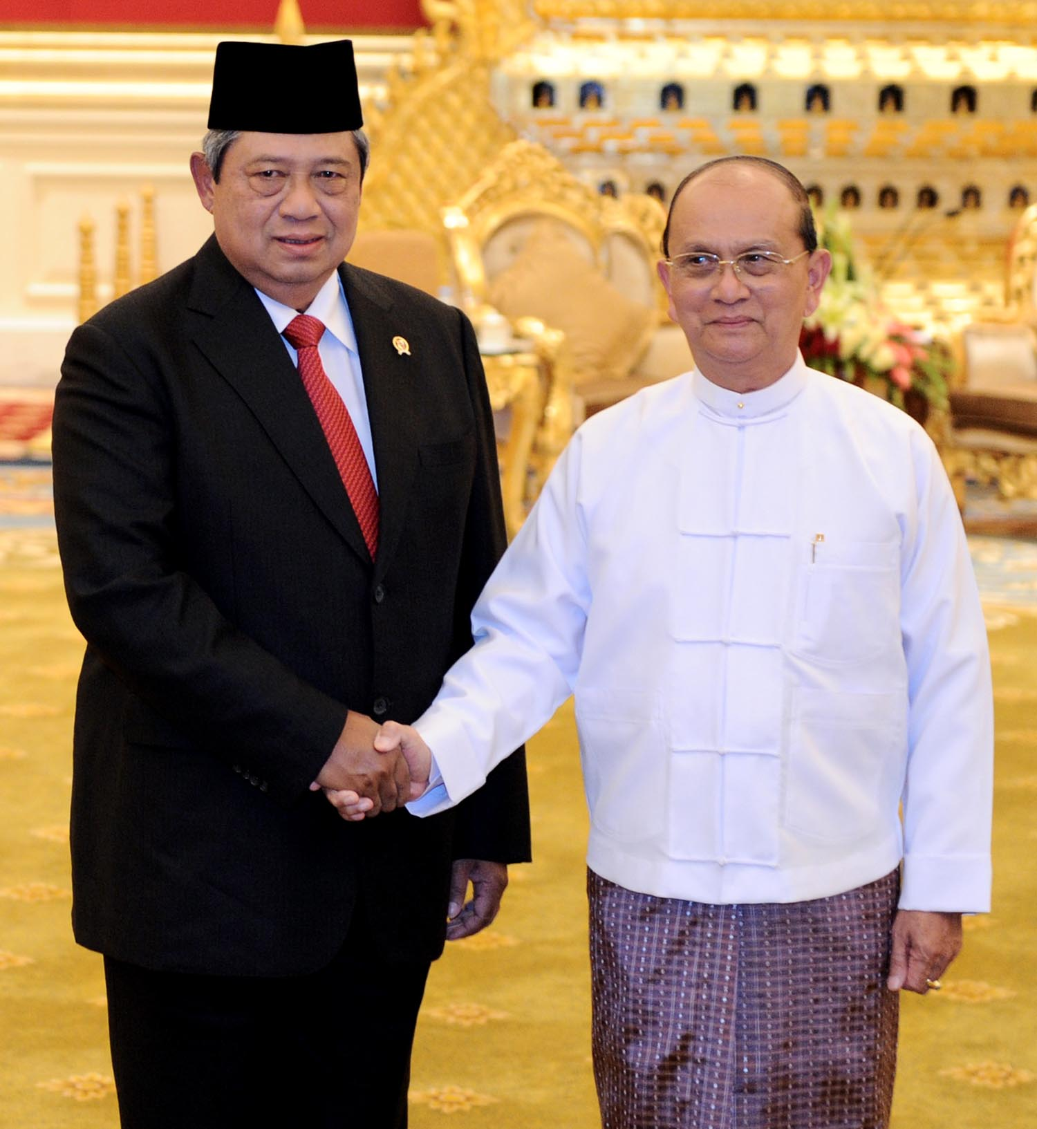 Presiden SBY bersama Presiden Myanmar Thein Sein di Istana Kepresidenan, Myanmar, 23 April 2013.